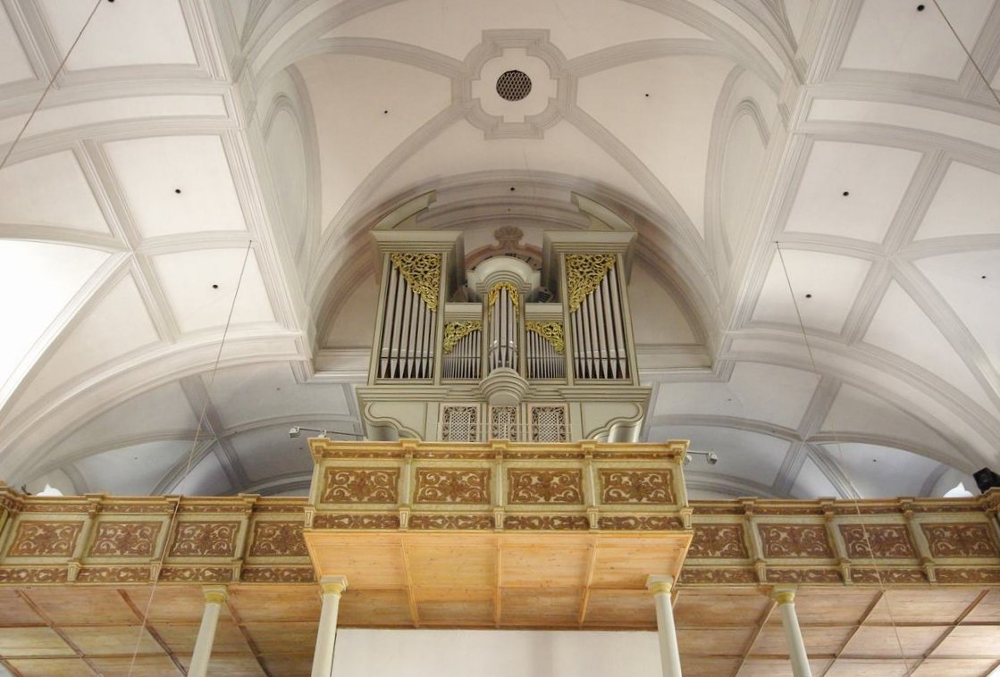 Rathausplatz 6, 83471 Berchtesgaden, Pfarrkirche St. AndreasThis is a photograph of an architectural monument.